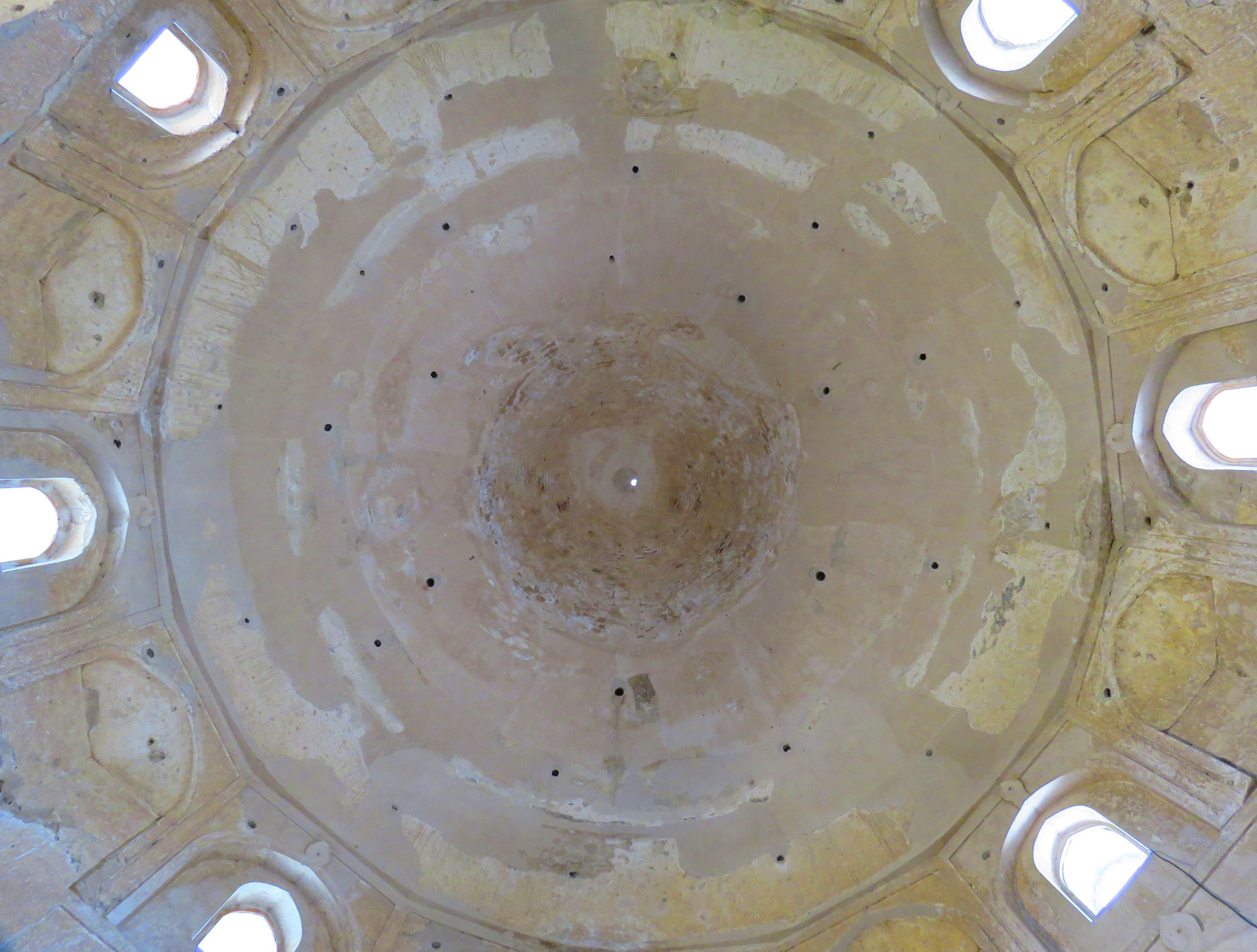 گنبد گبری